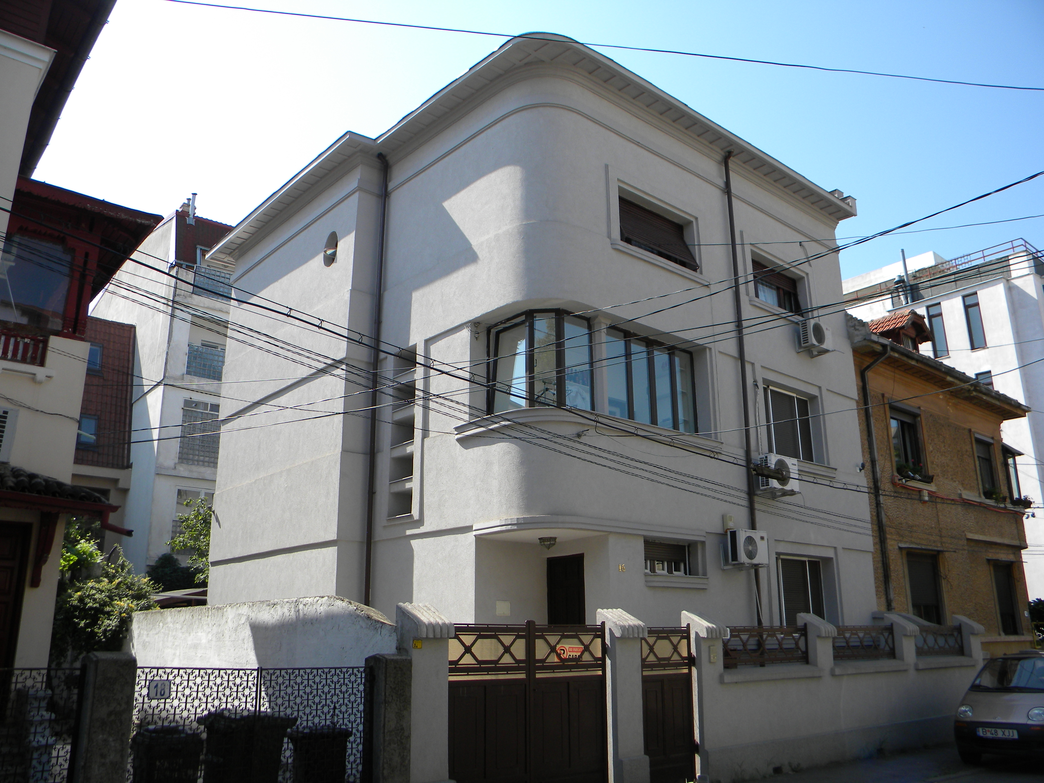 Bucuresti, Romania, Imobilul nr. 16 de pe Str. Naum Ramniceanu; B-II-m-B-19535 (vedere de pe colt)